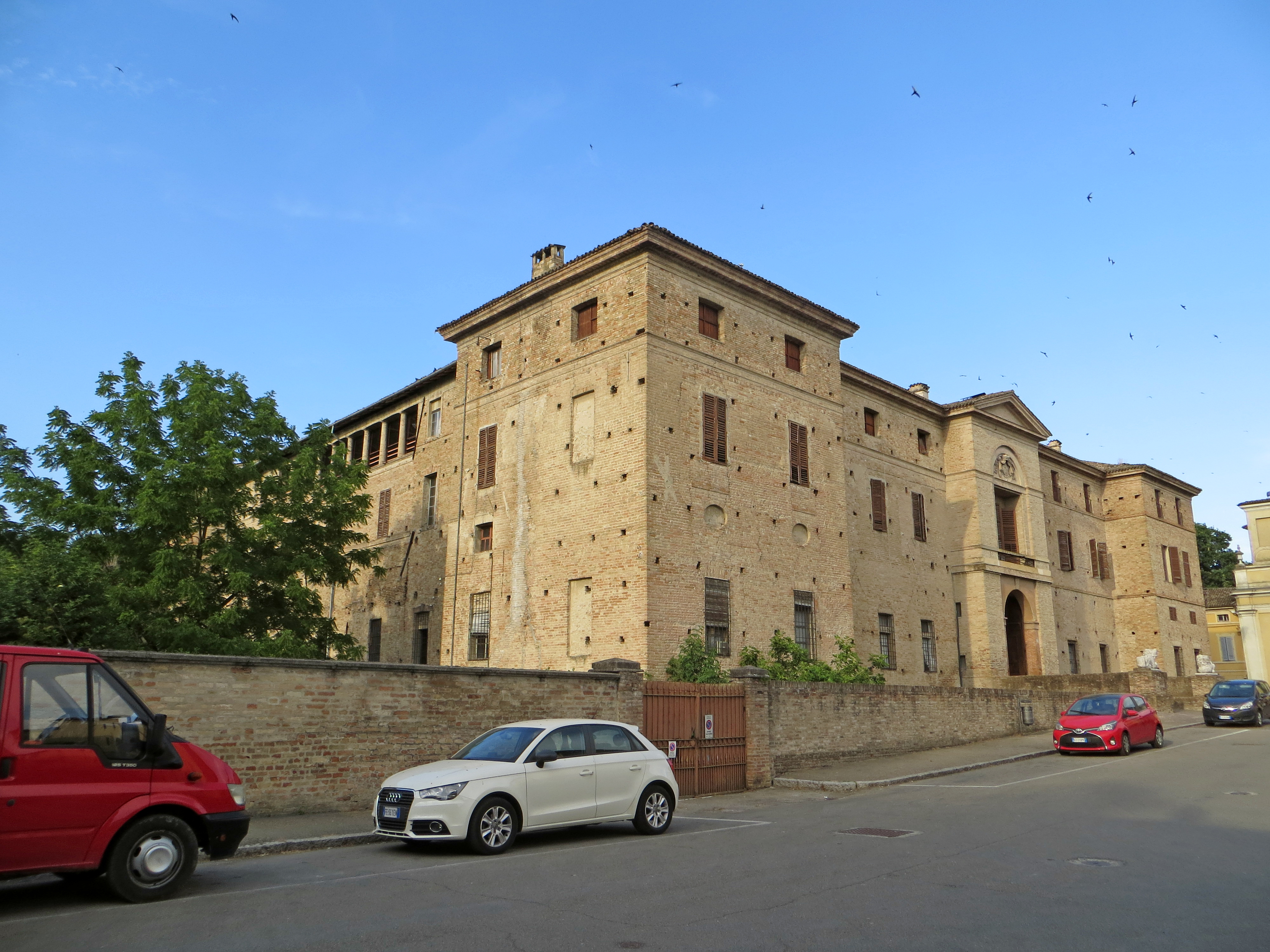 Rocca Meli Lupi (Soragna) - facciata e lato ovest